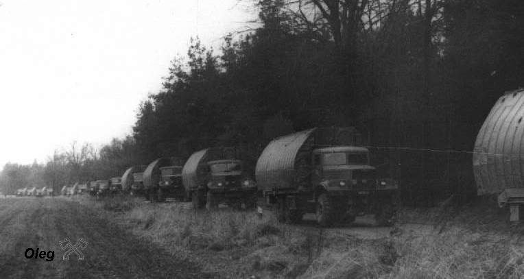 ПМП речное звено.